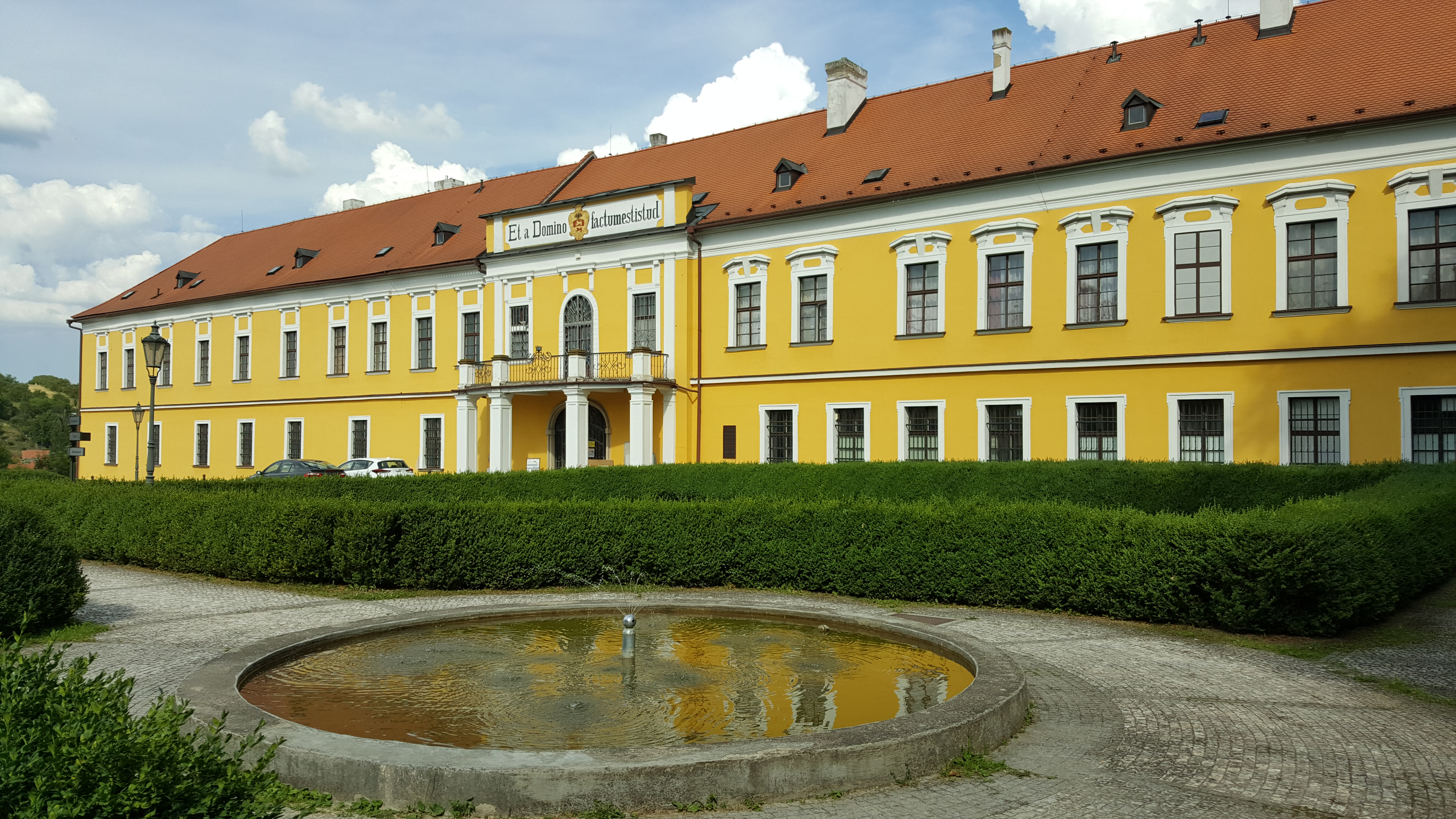 Zámek Líšeň